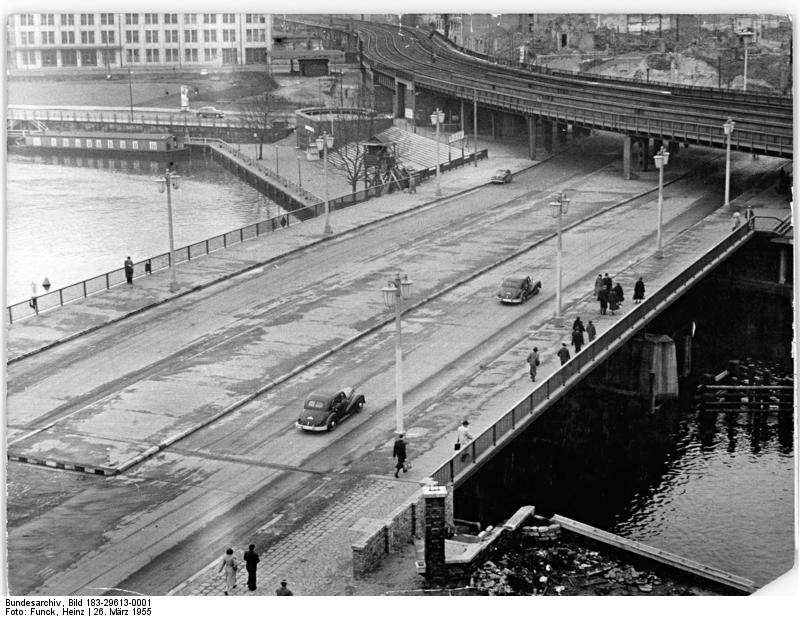 Berlin, Janowitzbrücke, Eisenbahnbrücke Zentralbild Funck 1 Mot. 26.3.1955 Blick auf die neuerrichtete Jannowitzbrücke in Berlin.